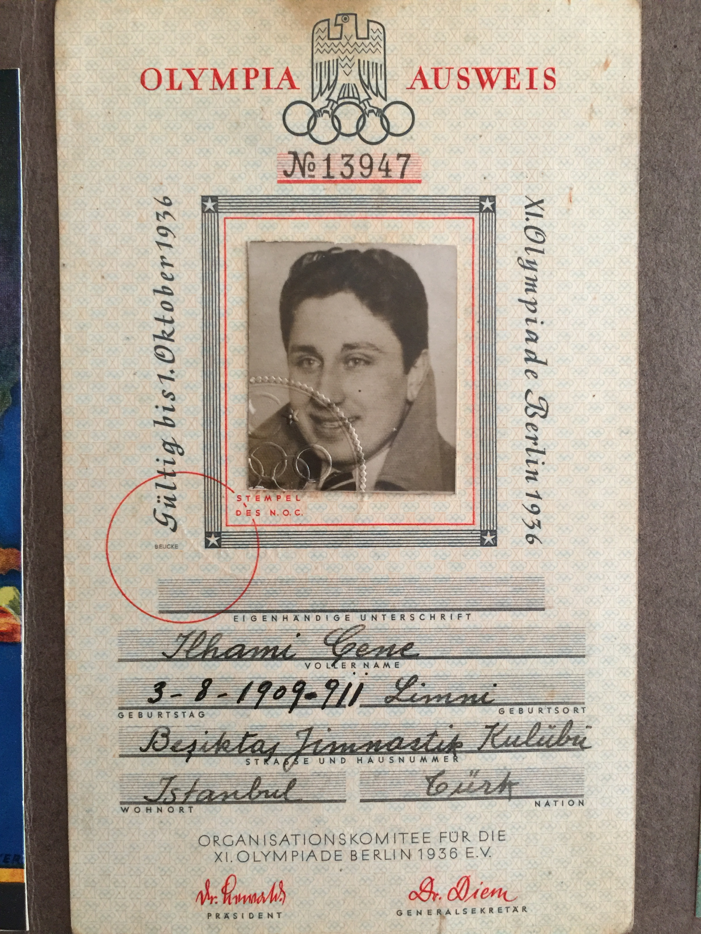 İlhami Çene- Olimpiyat Kimliği